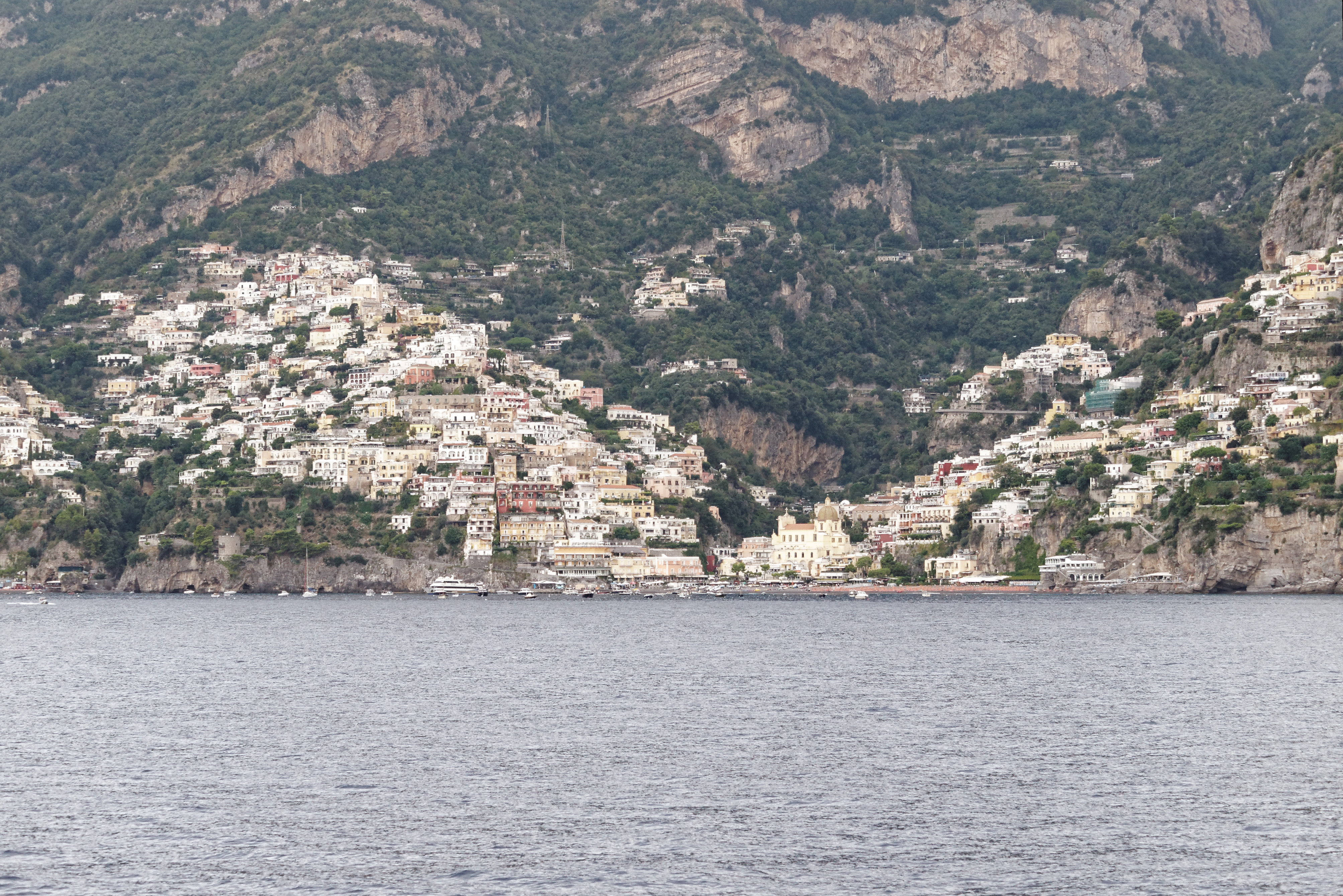 Positano, Ansicht von See, Kampanien, Italien